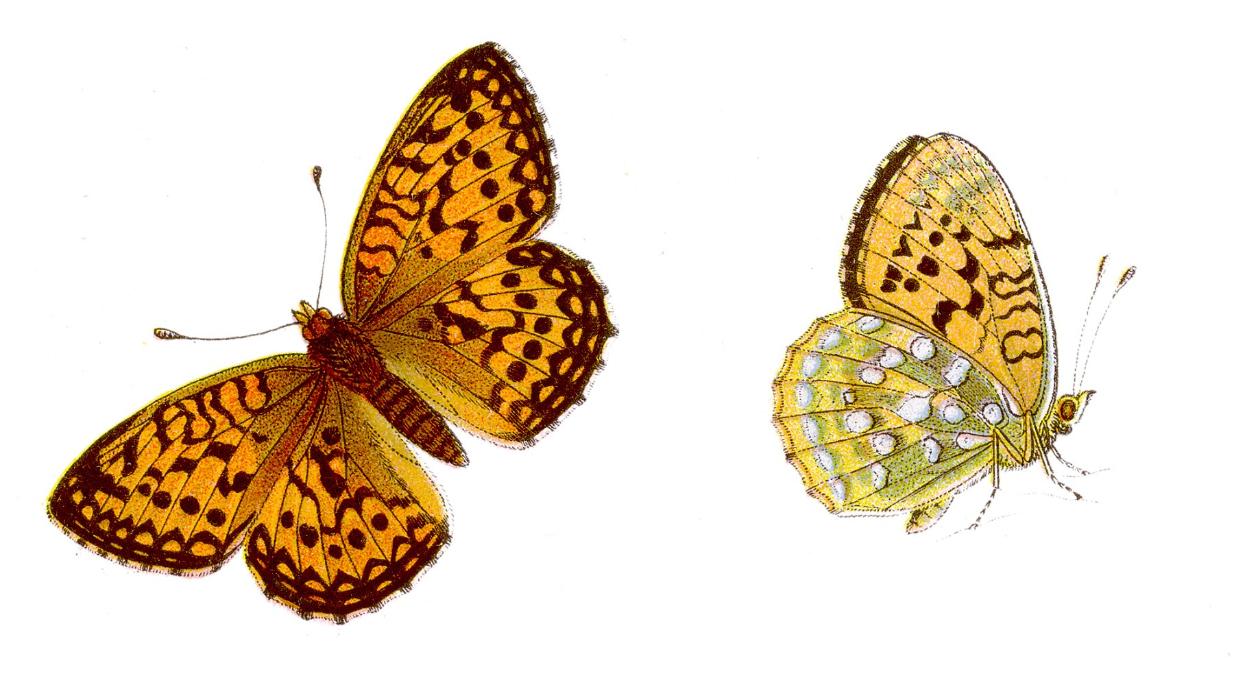 Großer Perlmutterfalter - Argynnis aglaja